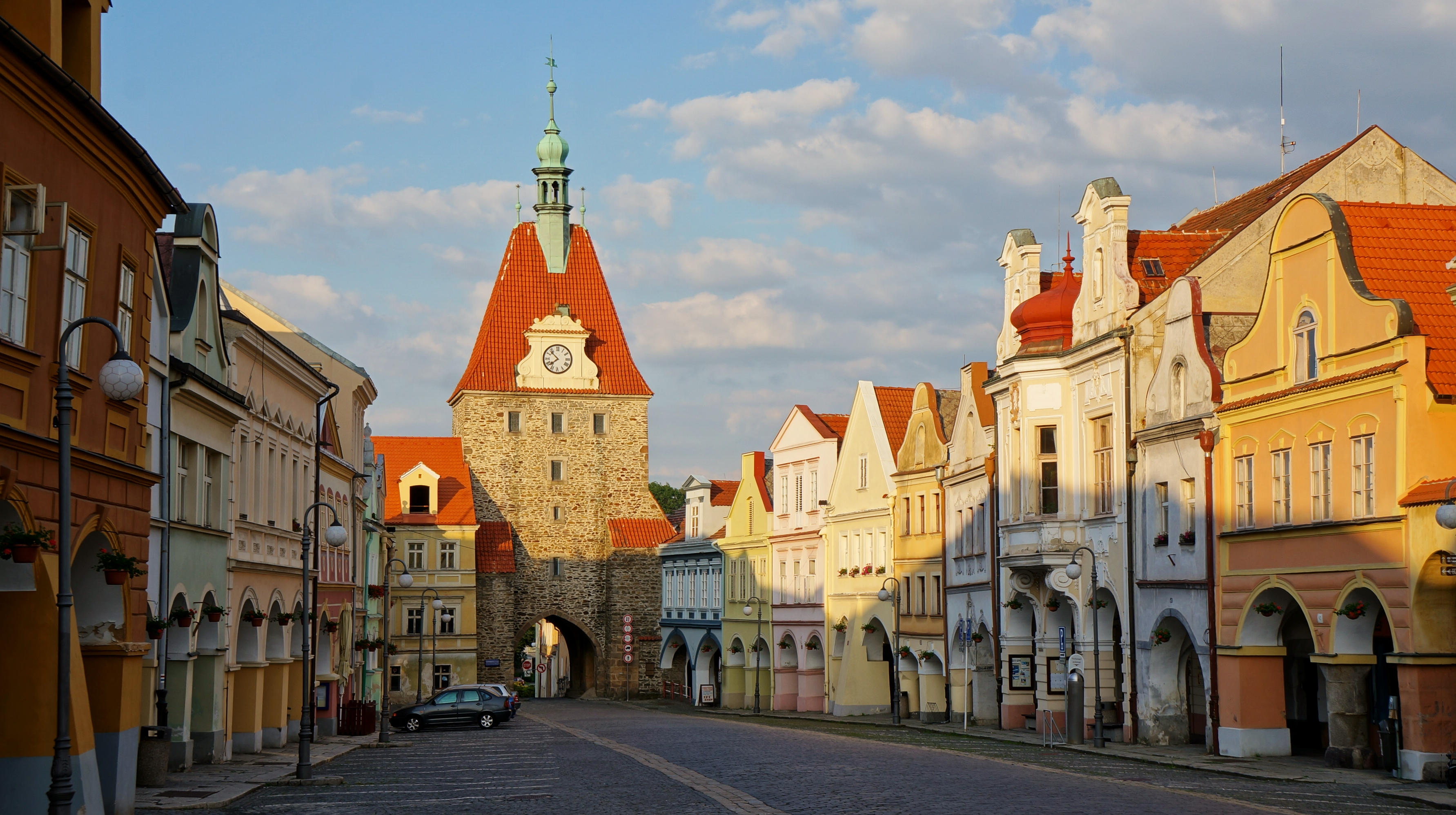 Městské opevnění (Domažlice), nám. Míru, Domažlice